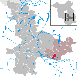 Straupitz in Brandenburg (Country) - District Dahme-Spreewald